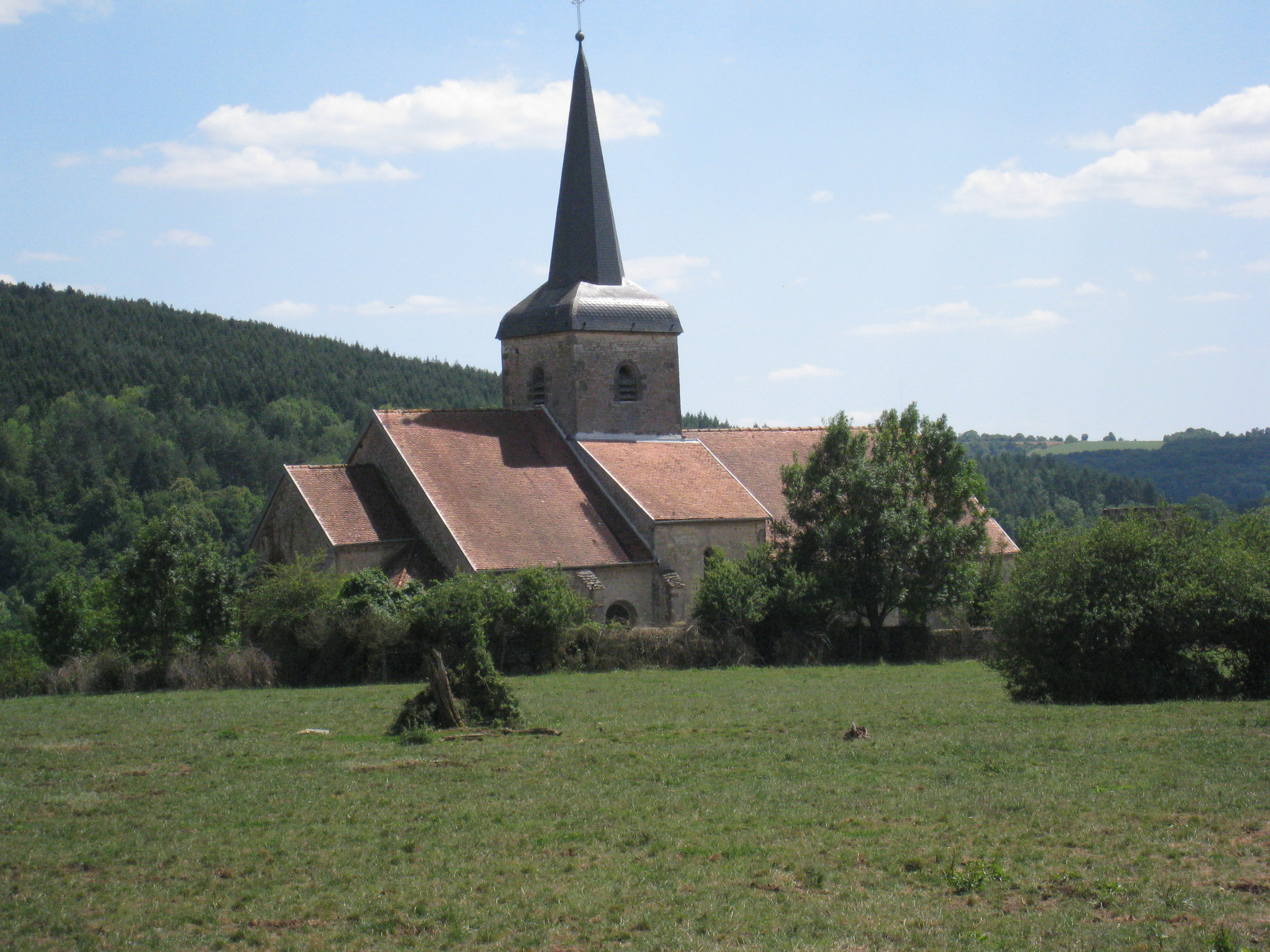 L'église de Coublanc